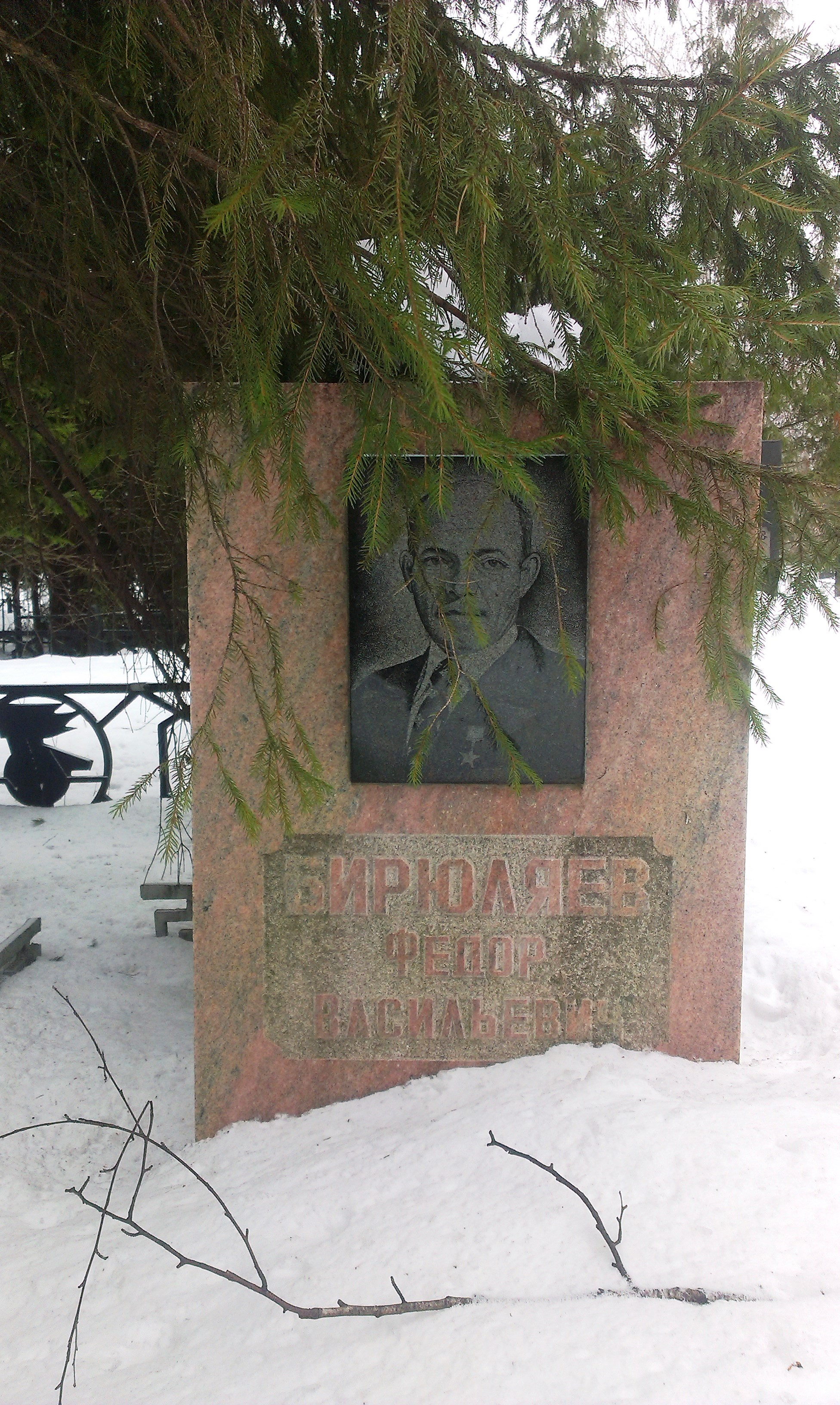 Южное кладбище в Новосибирске